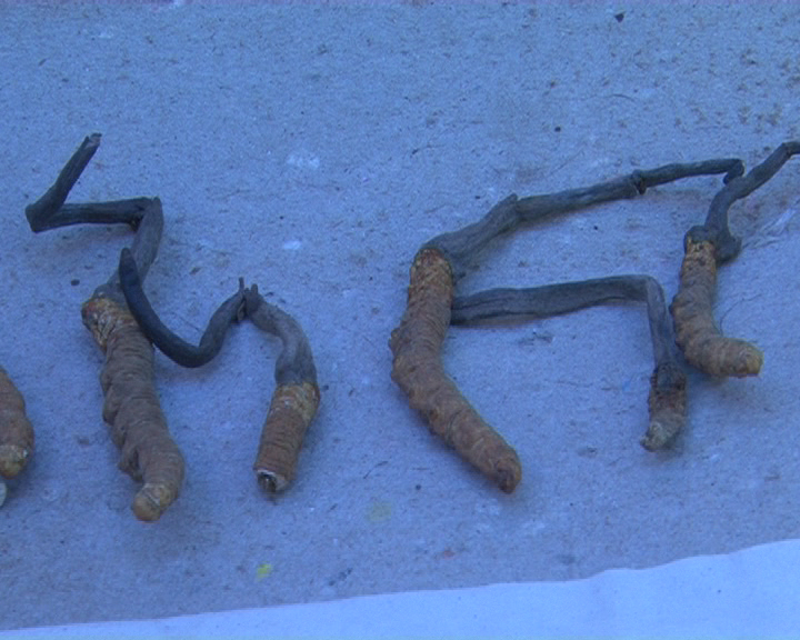 नेपाली: Yarcha gumba